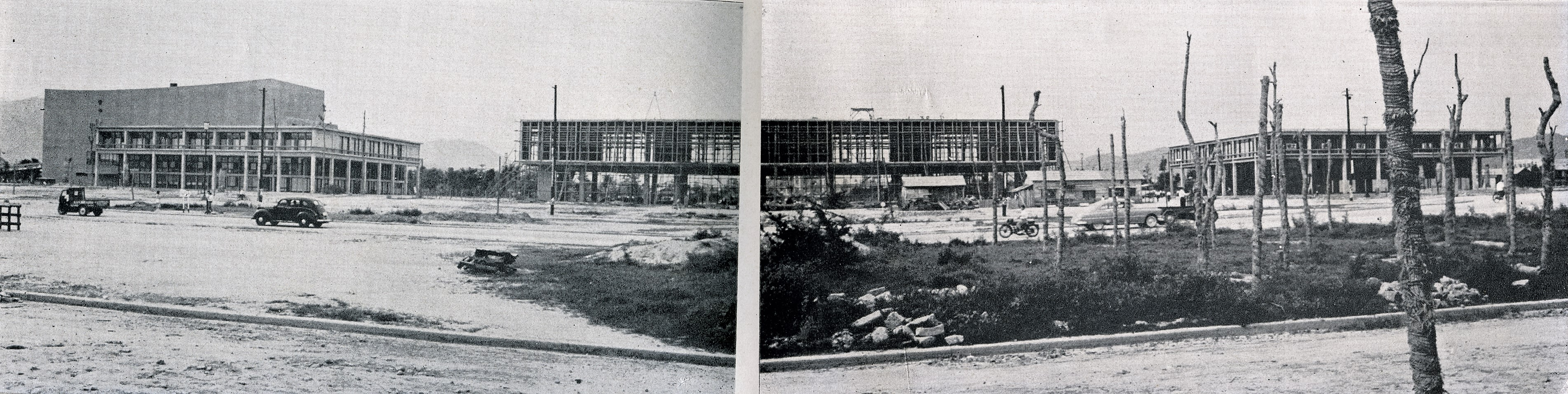 1950年代建設途中の広島平和記念資料館。1955年発行資料による。